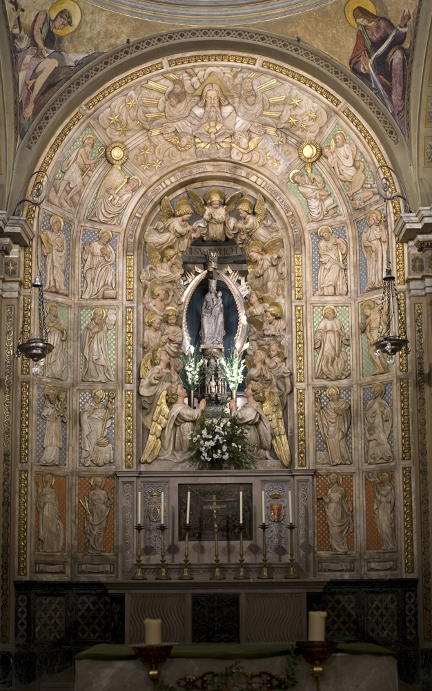 Capella de la Mare de Déu del Claustre, patrona de Solsona